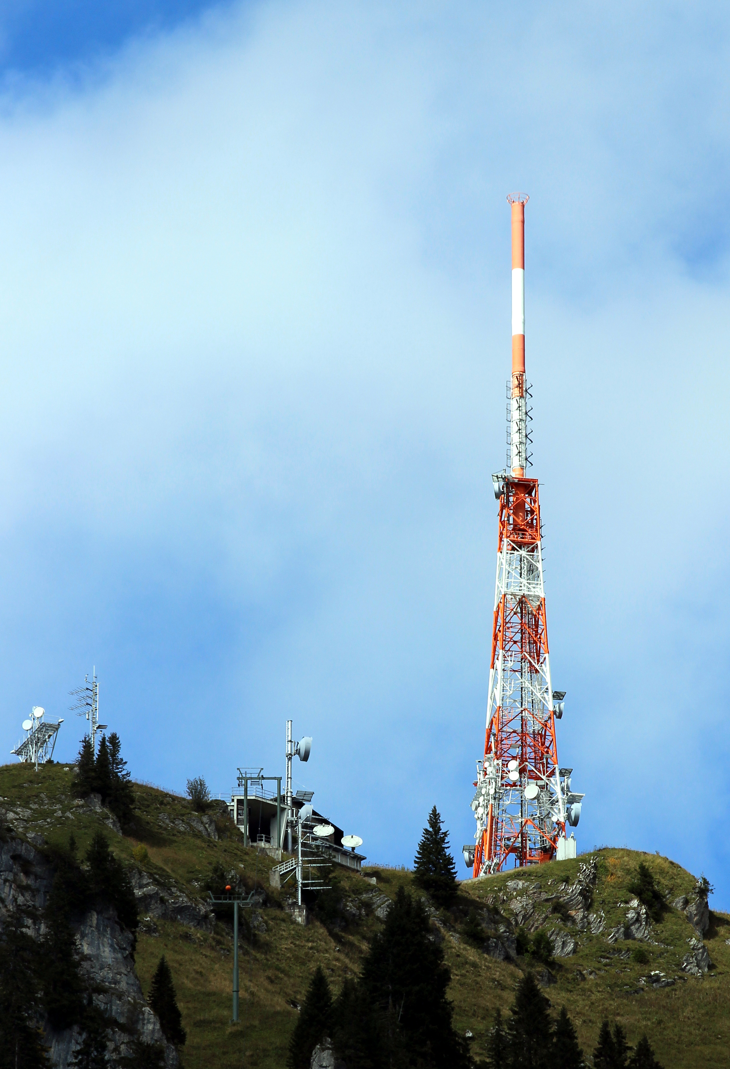 Sender Grünten, von den Erzgruben aus aufgenommen